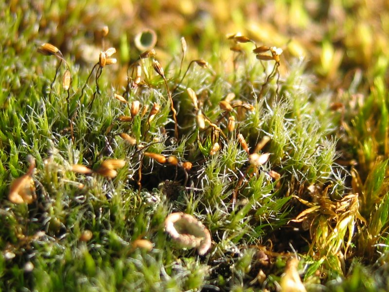 Campylopus introflexus, Hiddensee